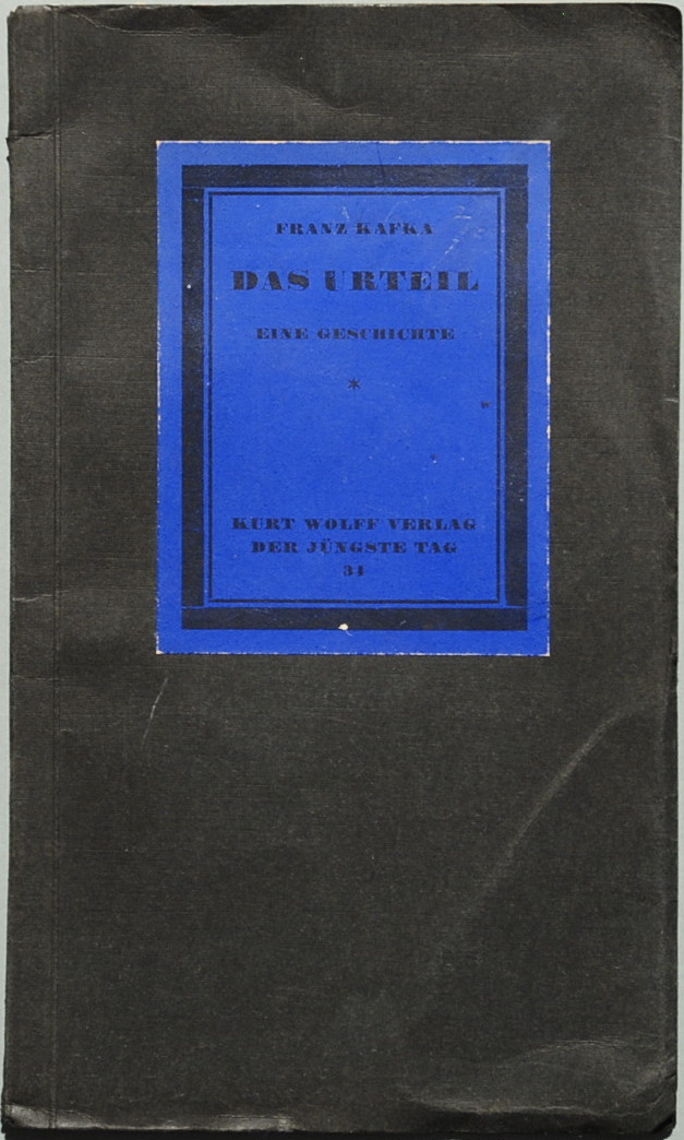 Kafka, Franz: Das Urteil. Eine Geschichte von Franz Kafka. Leipzig: Kurt Wolff 1916, 29 Seiten. Erstausgabe(Wilpert/Gühring² 4, Dietz 31). Orig.-Broschur (22 x 13 cm) mit Titelschild.